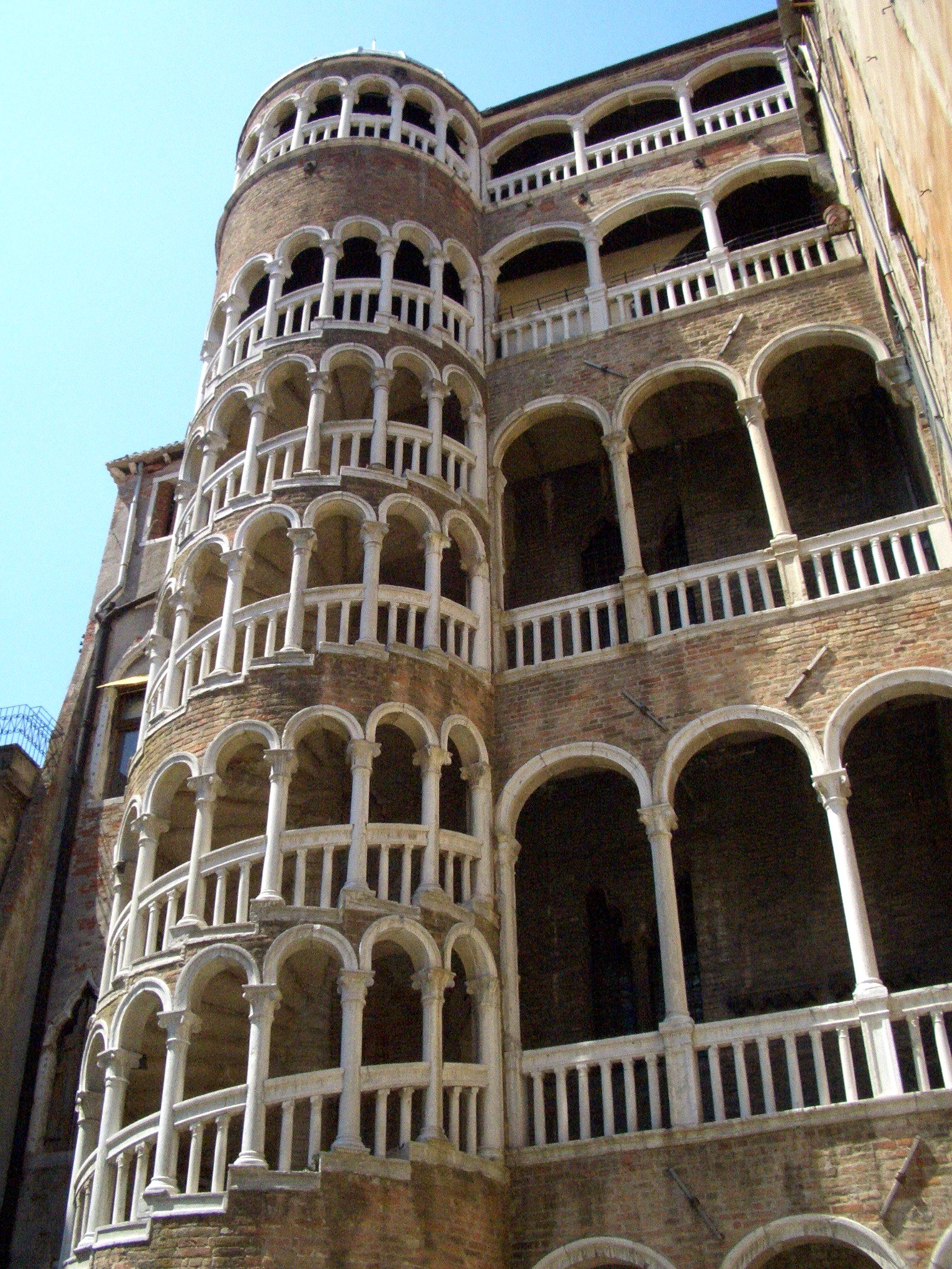 Scala contarini del Bovolo. Foto scattata da me a Venezia il 3.7.05.